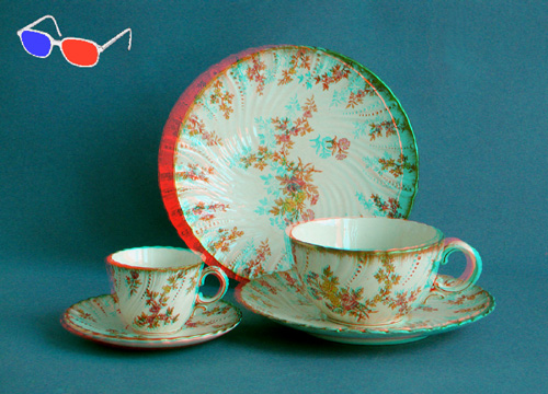 Obraz stereoskopowy - anaglif z wkopiowanymi okularami